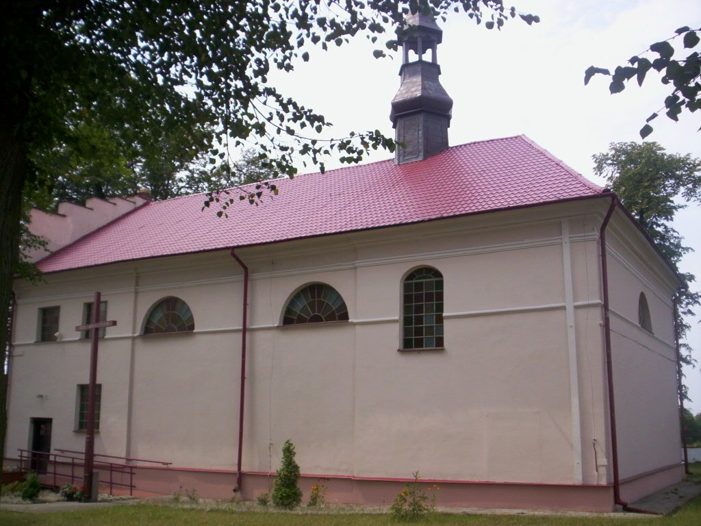 Красочин.